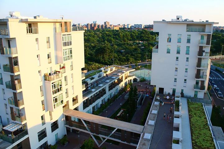 Vista dell'Housing Sociale "Cenni di Cambiamento" a Milano